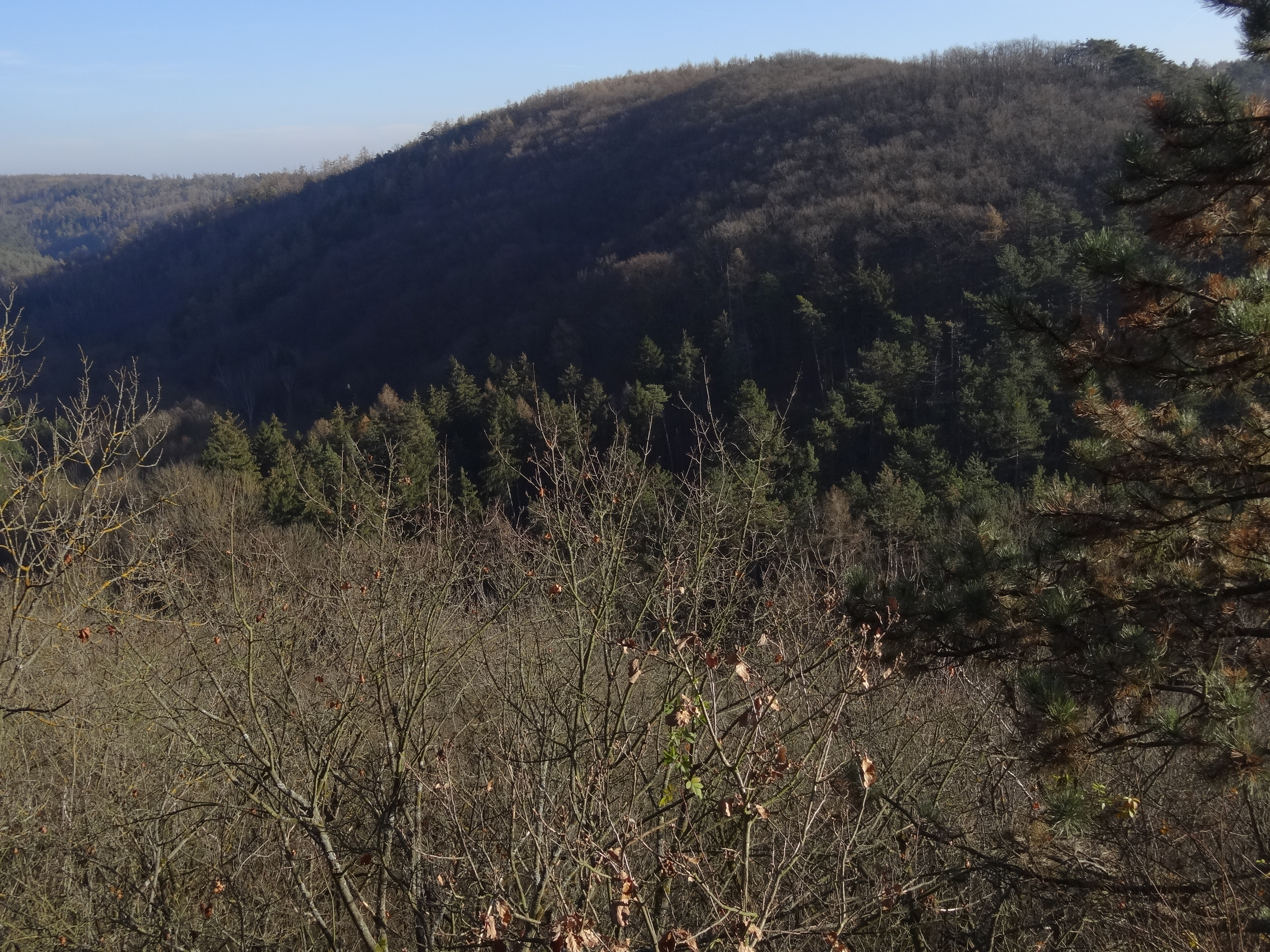 PR Klapice - celkový pohled na vrch z okraje Černých roklí